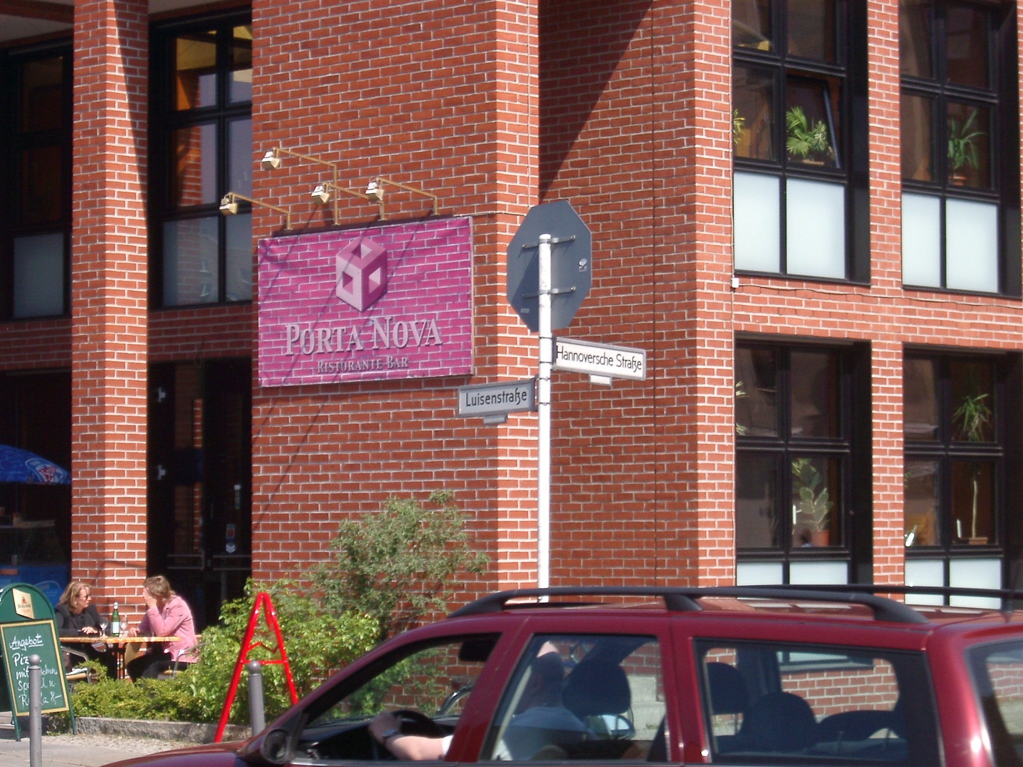 Pizzeria at Platz vor dem Neuen Tor (place before the new Gate) in Friedrich-Wilhelm-Stadt in Berlin-Mitte.